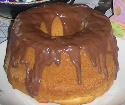 Baba wielkanocna z polewą czekoladową na wielkanocnym stole